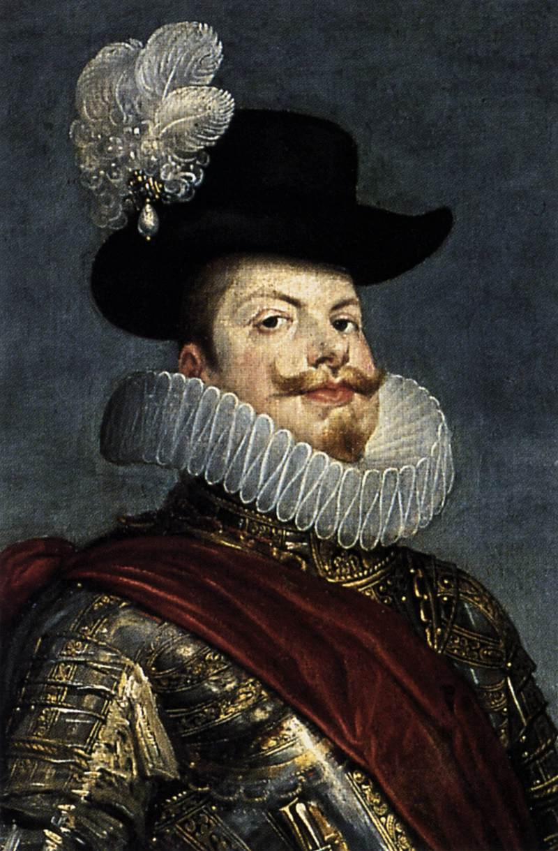 Retrato ecuestre del rey Felipe III de España (1578-1621), que fue hijo del rey Felipe II de España y de la reina Ana de Austria.